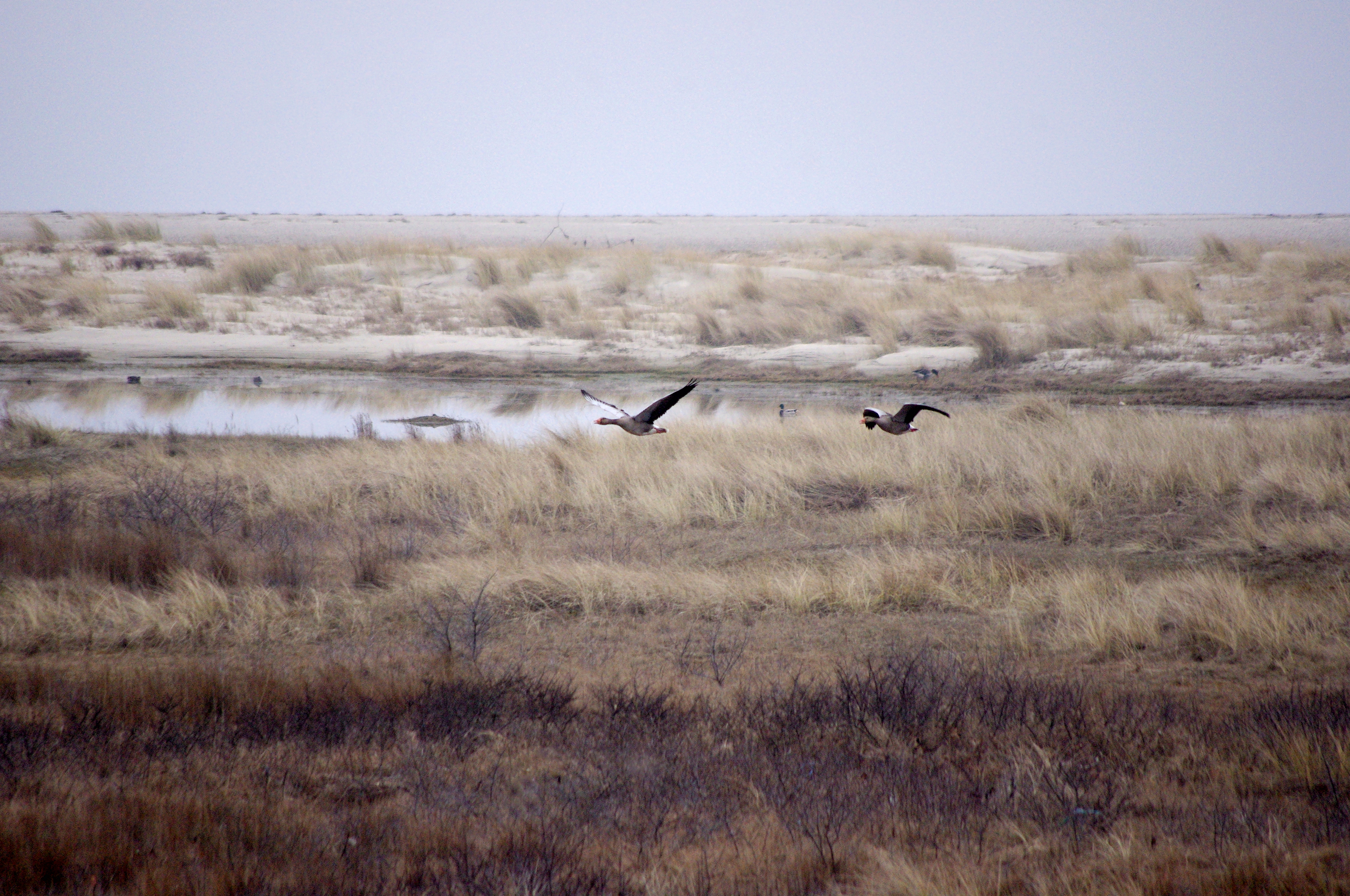 Im Frühling haben die Gänse bereits angefangen im Flinthörn Schutzgebiet auf der Insel Langeoog zu brüten, so wie auch viele andere Arten. Es handelt sich um einen Übergangsbereich von Sandstrand - Düne - Salzwiesen mit Wasserflächen. Der Sand lagert sich durch die Strömung am Flinthörn an. Seit 1986 gehört das Flinthörn als Ruhezone zum Nationalpark Niedersächsisches Wattenmeer. Zuvor war der Bereich bereits ab 1963 wegen seiner herausragenden naturschutzfachlichen Bedeutung als „Naturschutzgebiet Flinthörn" ausgewiesen.